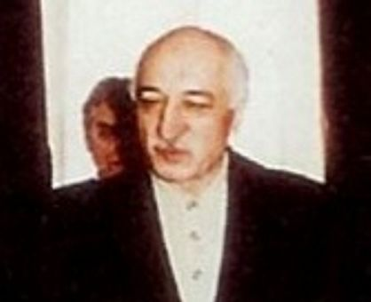 Fethullah Gülen beim Papst